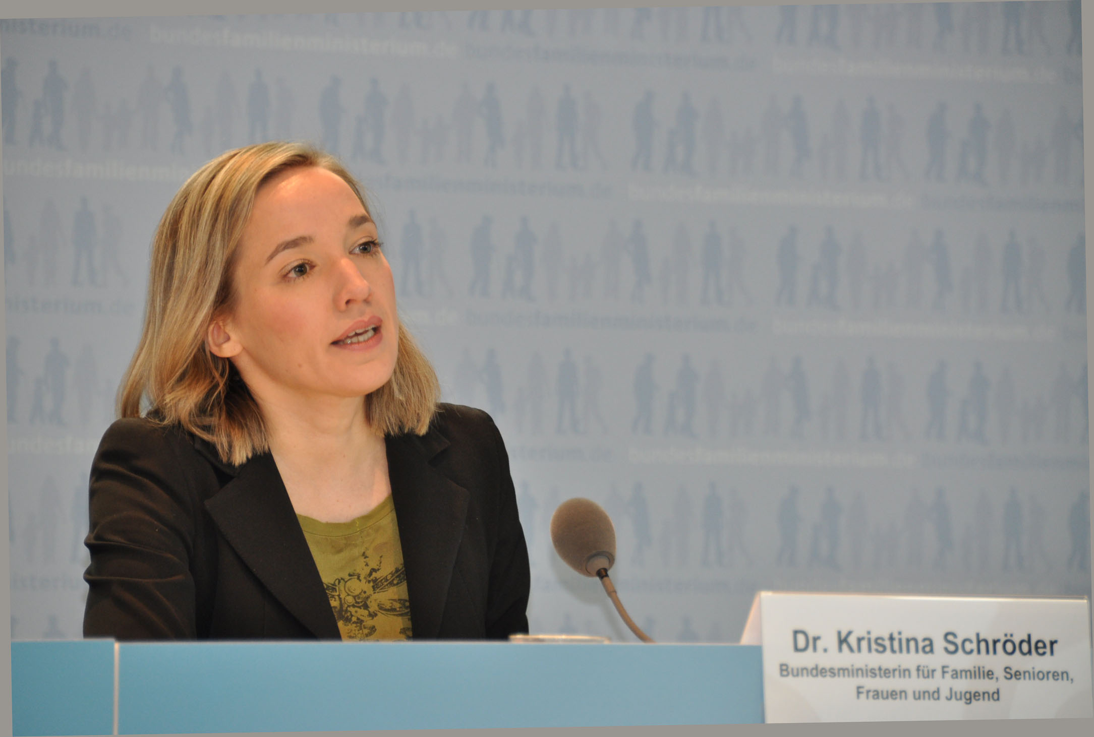 Kristina Schröder, Bundesministerin für Familie, Senioren, Frauen und Jugend, aufgenommen am 16.01.2013.